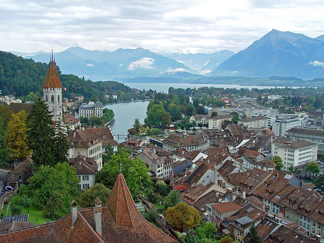 کوردی: شارى ثون